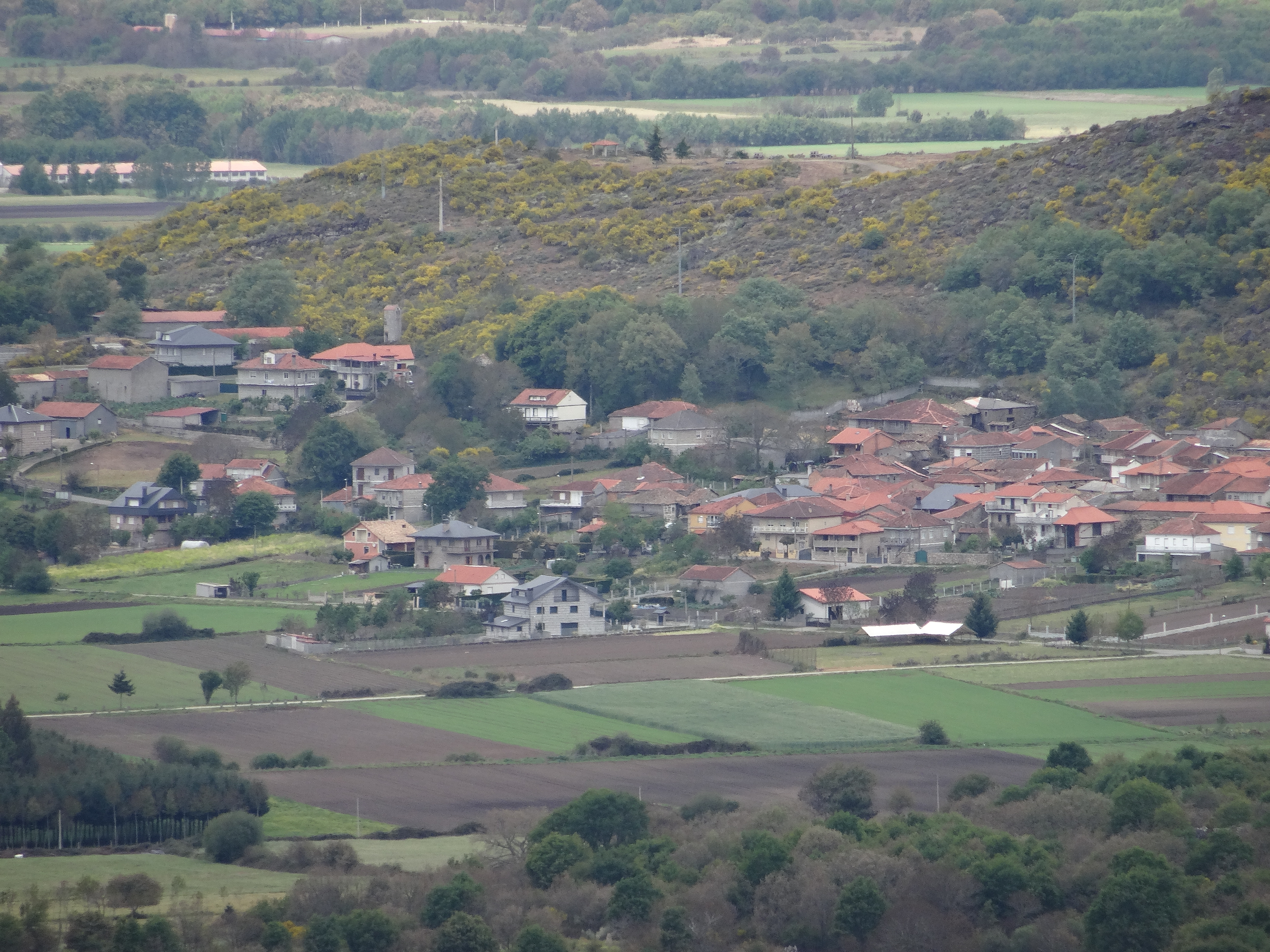 Ver título